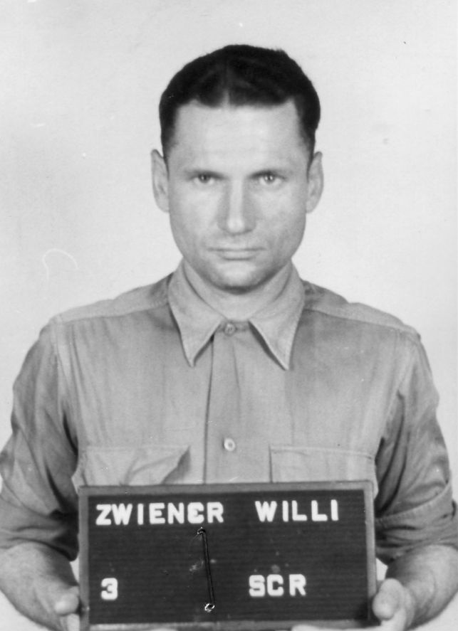 Haftbogenfoto des Angeklagten Willi Zwiener (16.02.1908 in Frankfurt/Oder - 14.01.1965 in Kassel), Häftling im Konzentrationslager Buchenwald (Haft-Nr. 27900), Lagerältester und Lagerhenker im Konzentrationslager Mittelbau-Dora sowie Kapo in dessen Außenlager Ellrich-Juliushütte, im Dachauer Dora-Prozess am 30.12.1947 zu 25 Jahren Haft verurteilt.